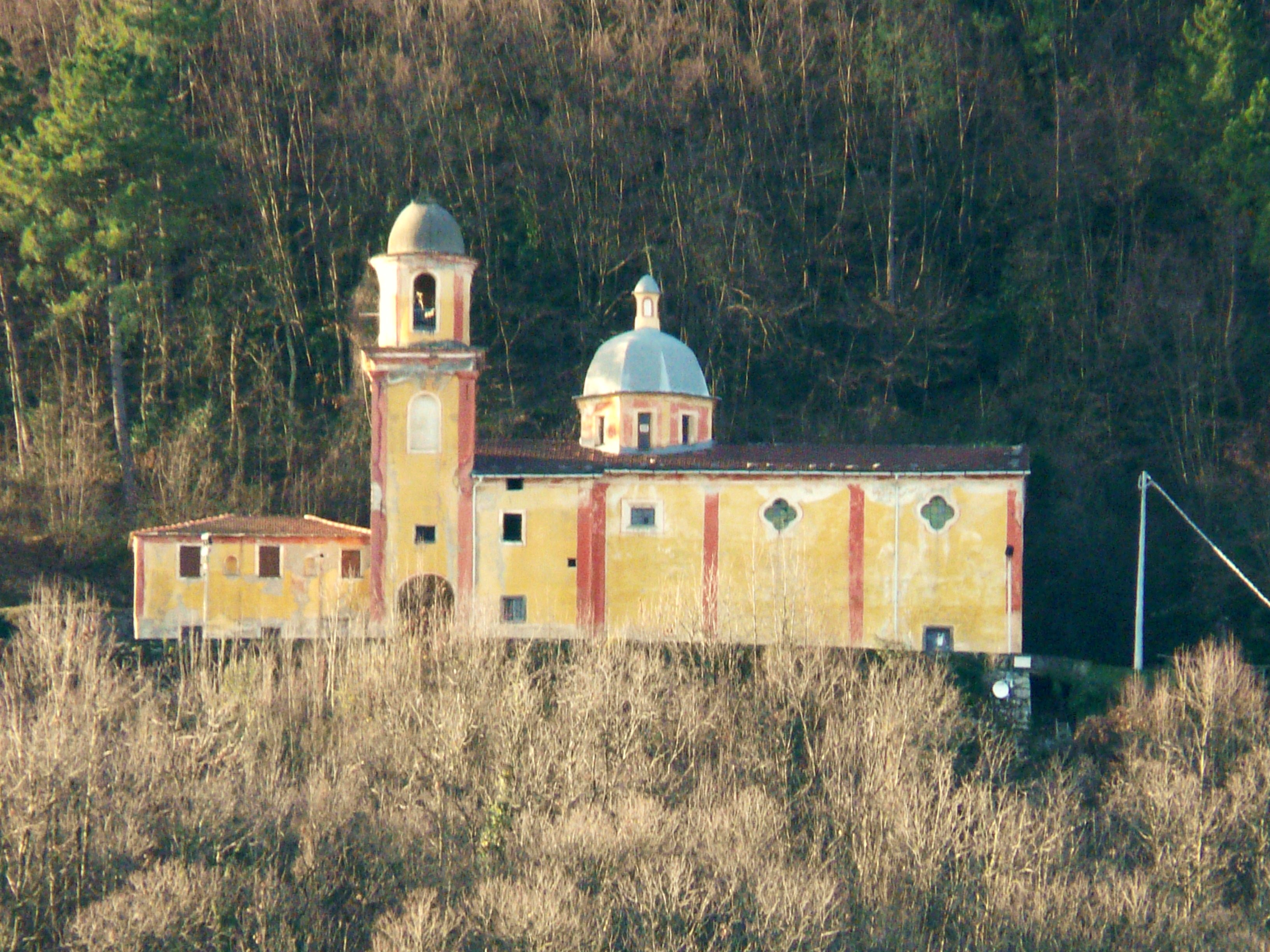 Santuario di Nostra Signora dell'Agostina, Riccò del Golfo di Spezia, Liguria, Italia